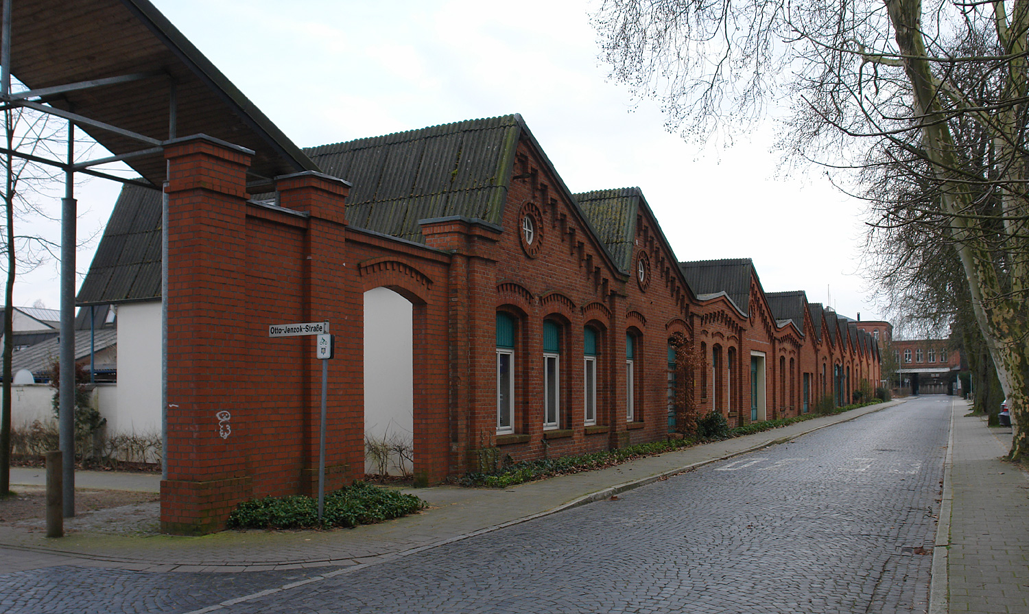 Nordwolle in Delmenhorst. Sheddachhalle, heute Wohnungen